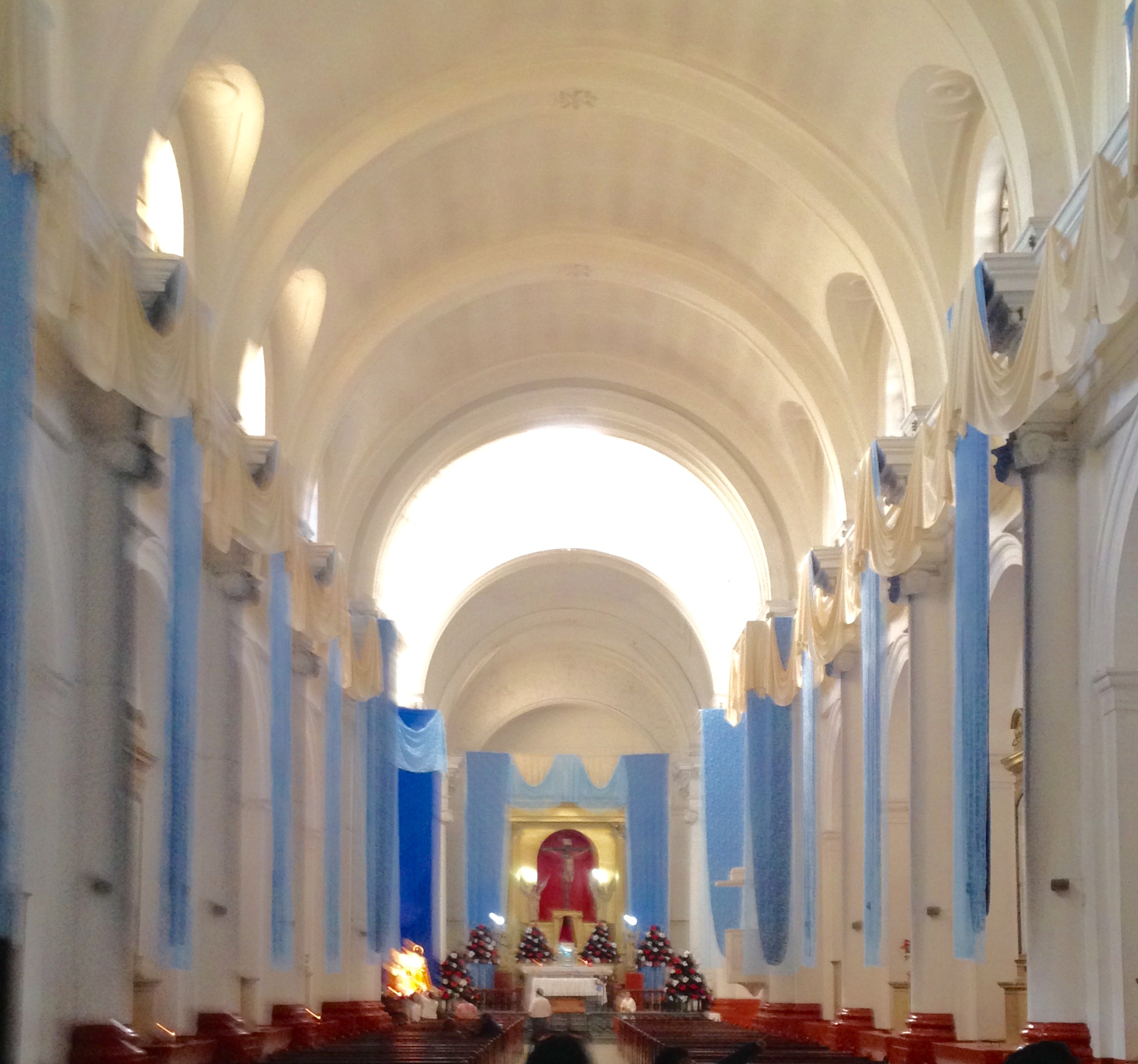 Nave central de la Iglesia de La Recolección, Ciudad de Guatemala. Diciembre de 2015.